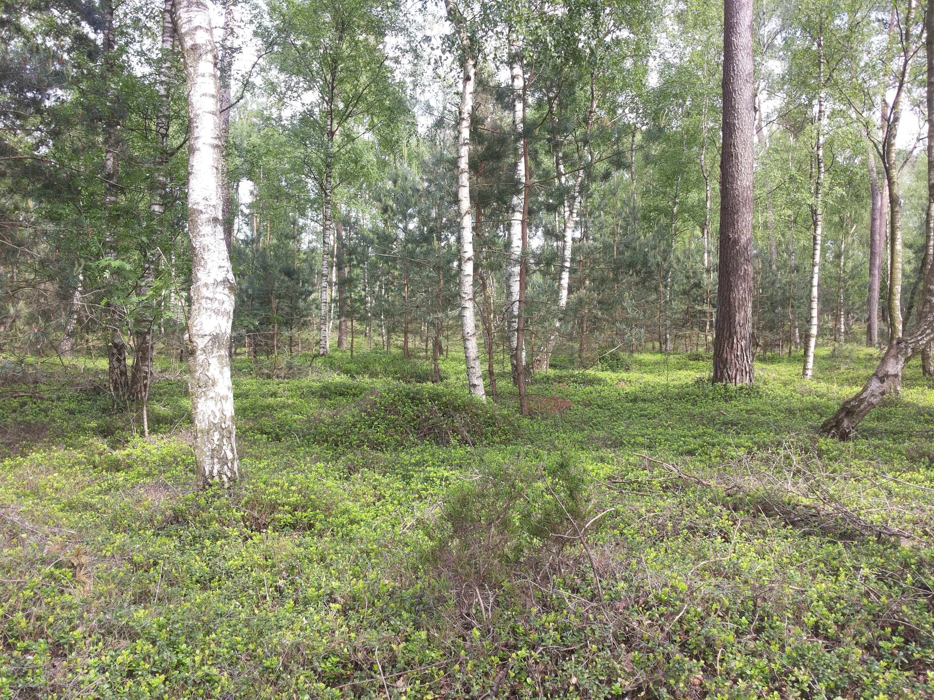 Landschap in Nationaal Park Sallandse Heuvelrug, Overijssel, Nederland This is a photo or sound file made in Sallandse Heuvelrug National Park in the Netherlands, with the main subject of the file in the category: landscapes